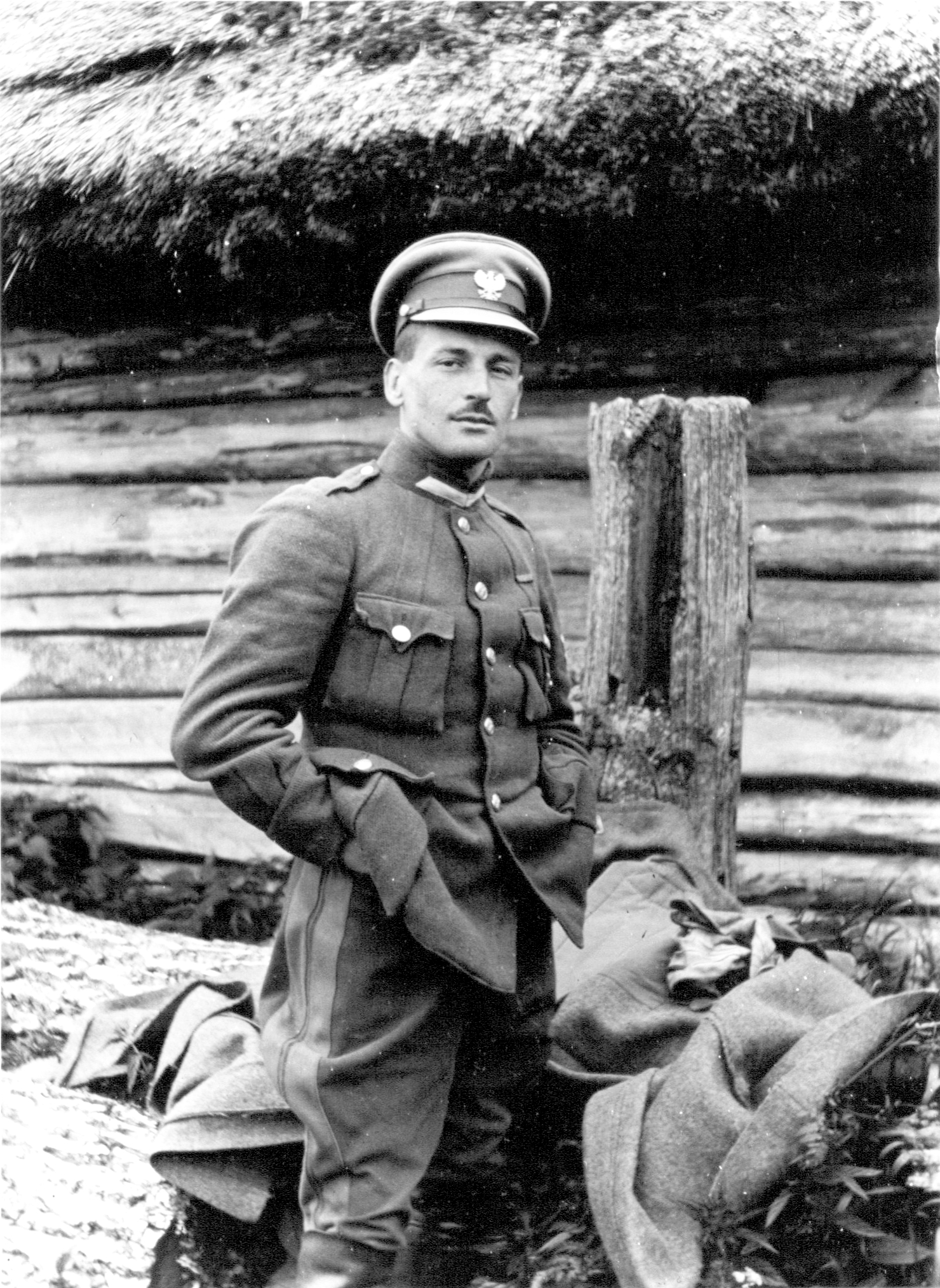 Antoni Bogusławski w 1918 roku w 1 Pułk Ułanów Krechowieckich im. płk. Bolesława Mościckiego.Na rew. adnot.: z archiwum I Pułku Ułanów Krechowieckich w Londynie. Mjr. dyplomowany Antoni Bogusławski, fot. zamieszczona na str. 49 w książce "Dzieje I Pułku Ułanów Krechowieckich", WBH Warszawa 1932 r.